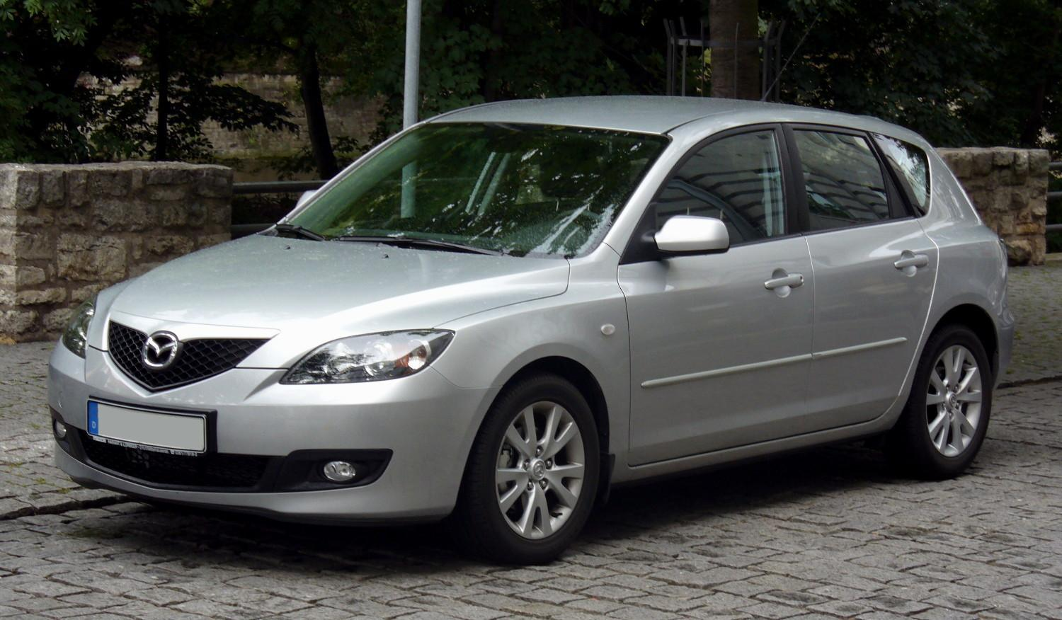 Mazda 3 Facelift